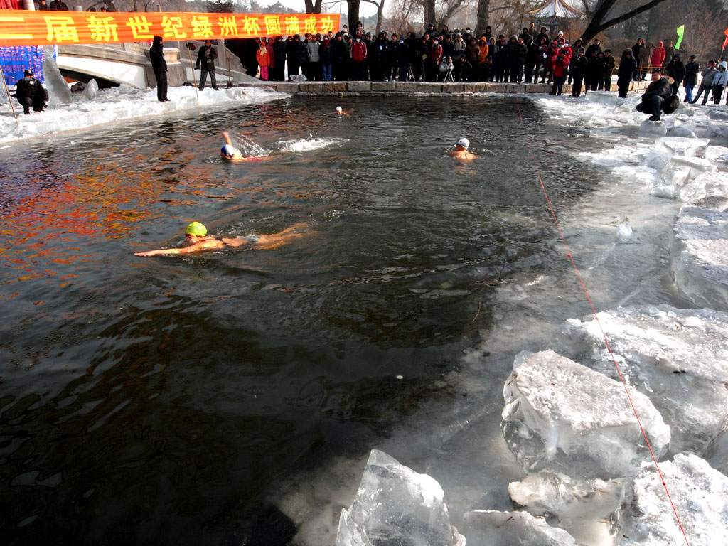 冬泳